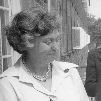 Joachim Klaiber (3.v.l.) bekommt zu seiner Pensionierung von Kultusminister Walter Braun (6.v.l.) auf dem Balkon des Kultusministeriums am Düsternbrooker Weg 64 die Auszeichnung verliehen. Im Bild links Frau Klaiber (1.v.l.) und im Hintergrund Jürgen Becker-Birck aus der Staatskanzlei Schleswig-Holstein (2.v.l.), Kulturdezernent Karl-Heinz Zimmer (4.v.l.) und Albert Rhode (5.v.l.) vom Orchestervorstand.